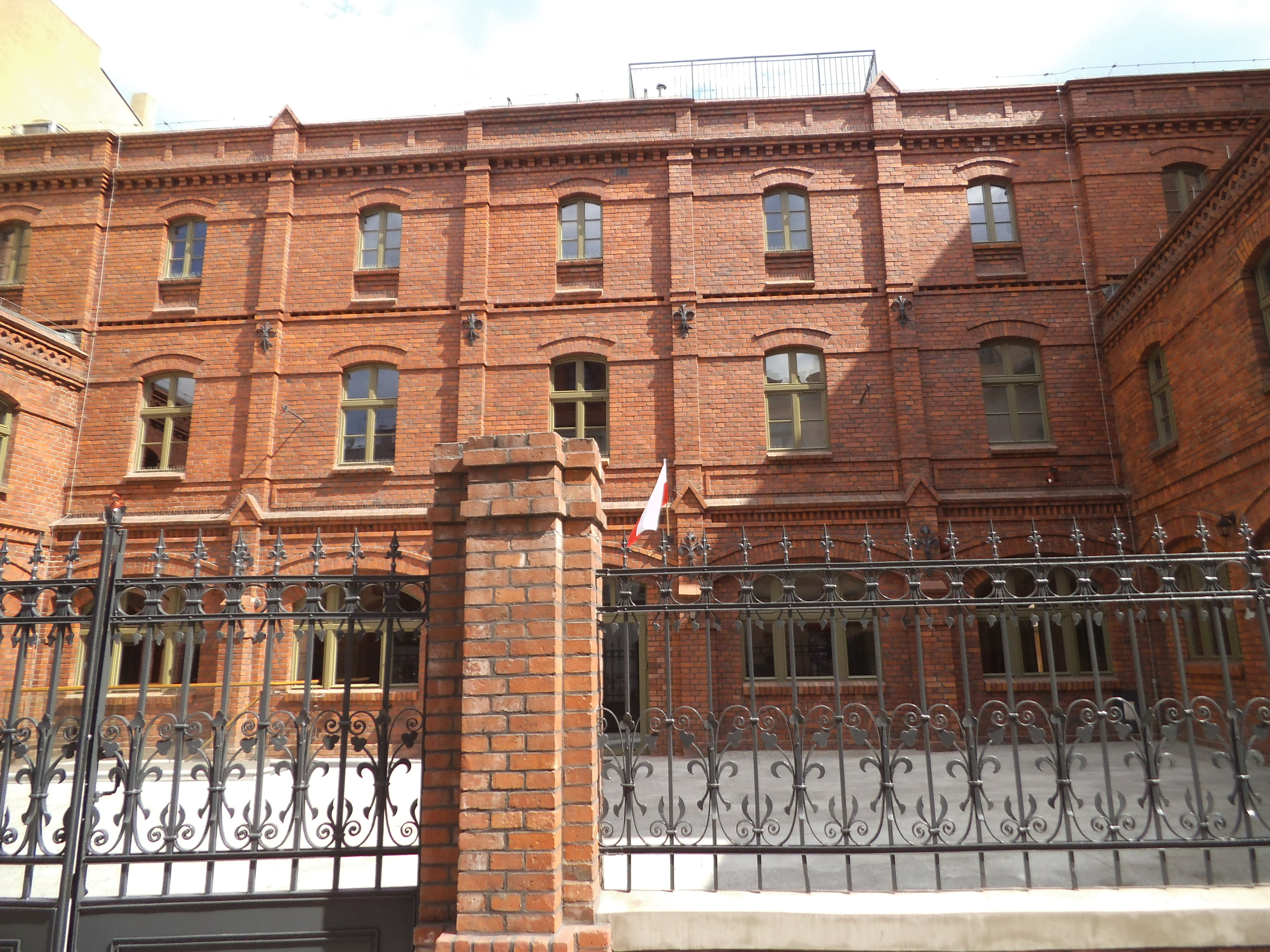 Muzeum Toruńskiego Piernika